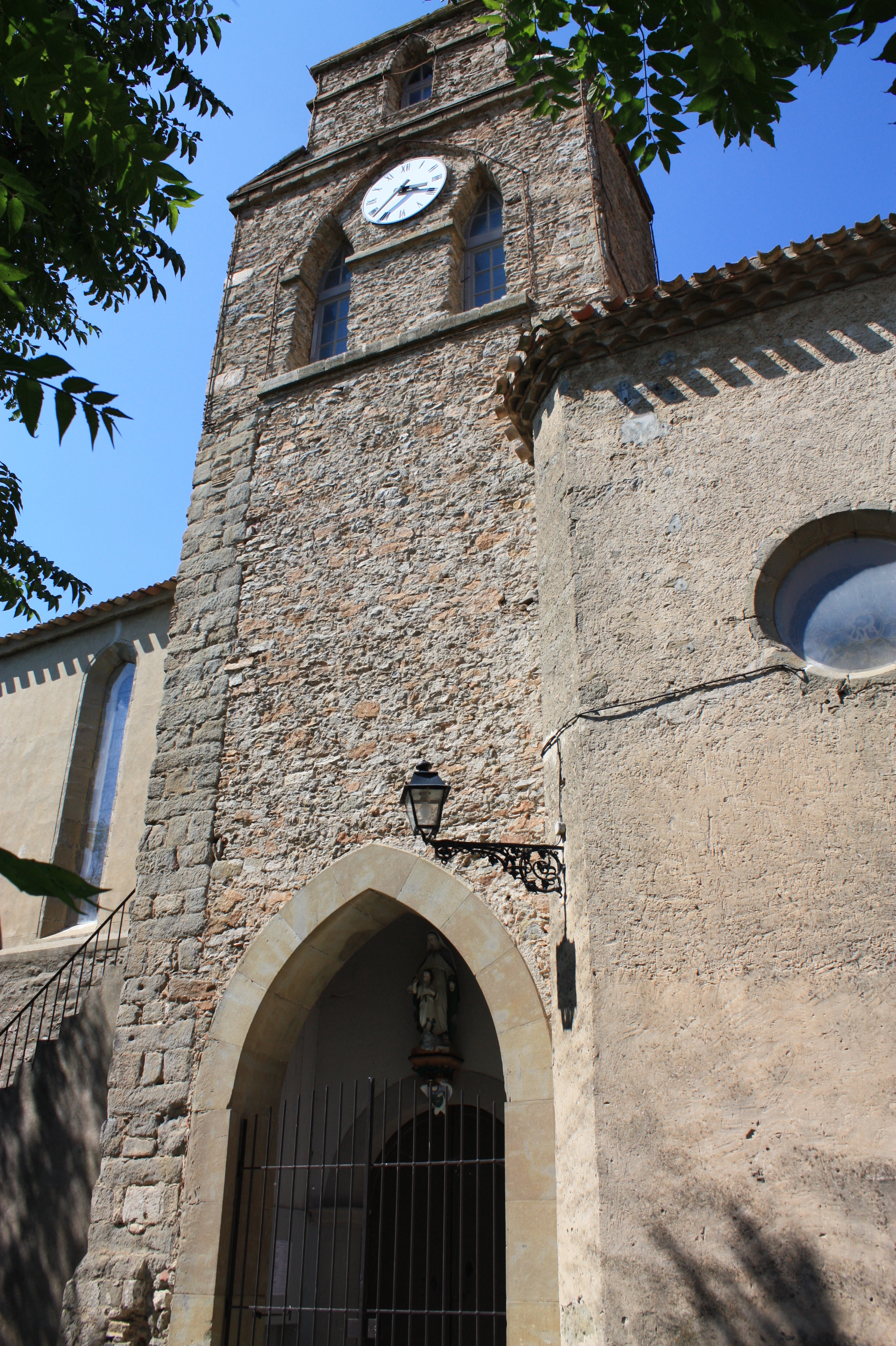 Badens